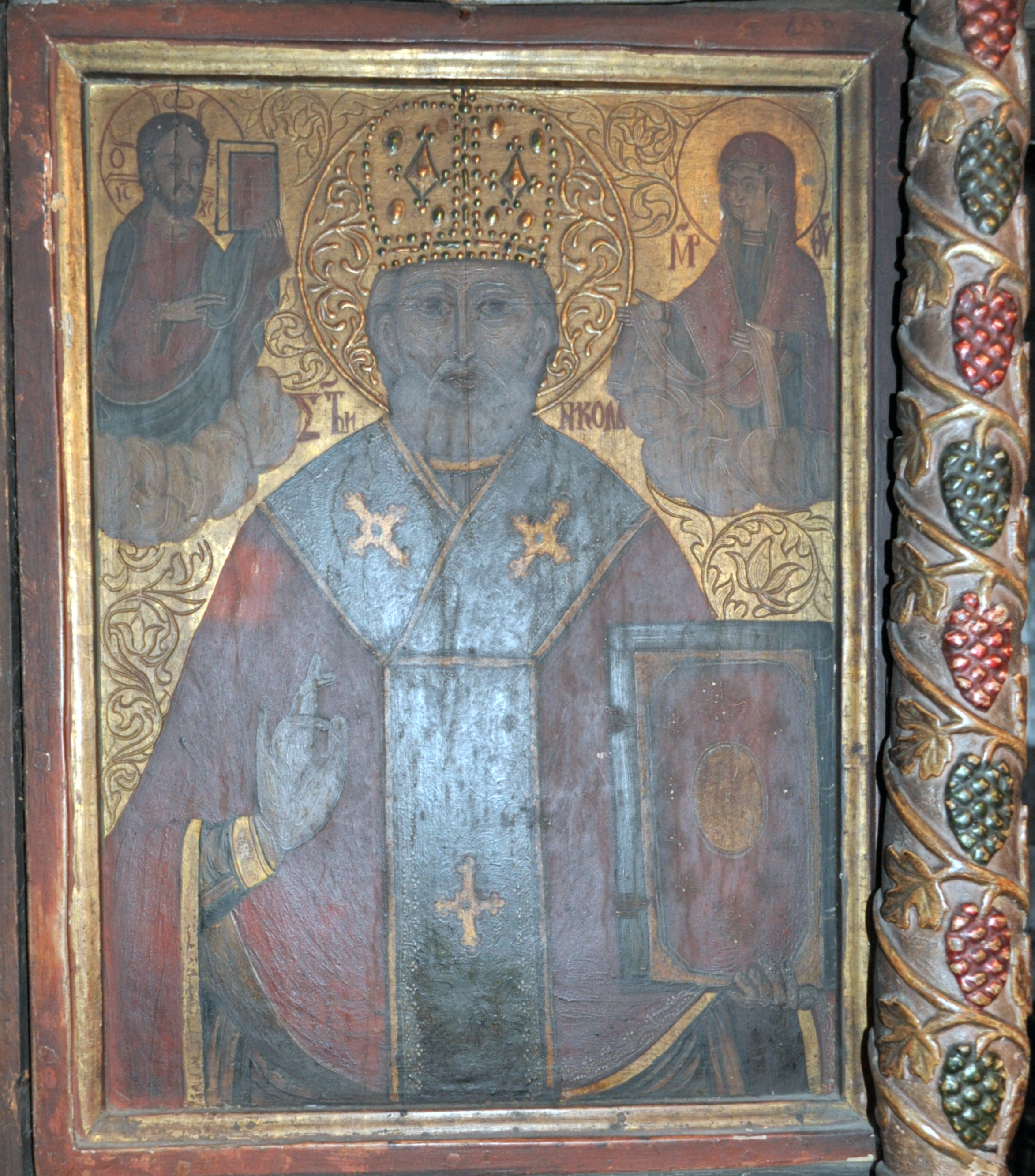 Biserica de lemn „Sfinții Arhangheli” din Reghin, județul Mureș